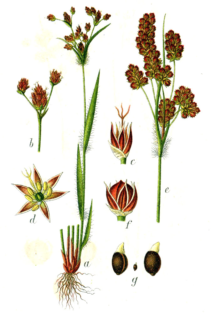 Luzula multiflora (Ehrh.) Lej. s. str. Original Caption Grosses Hasenbrot, Luzula multiflora